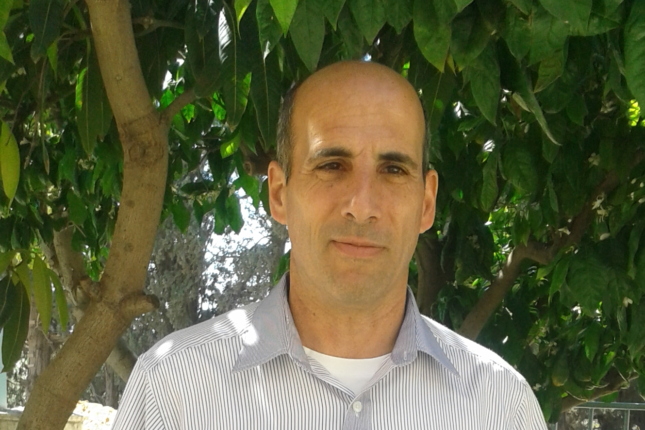 Shimi Kadosh